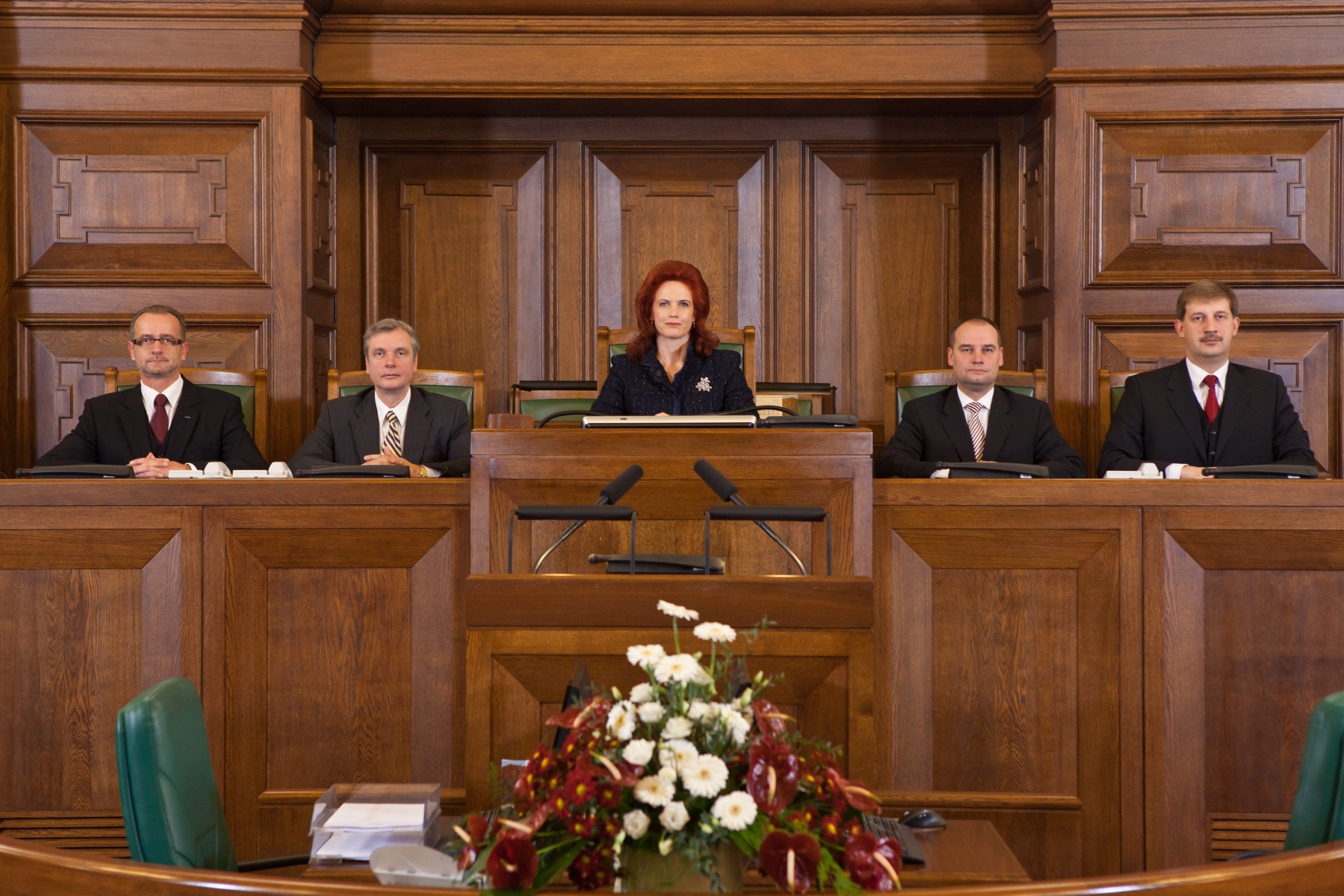 10.Saeimas Prezidijs. Attēlā no kreisās: Saeimas sekretāra biedrs Dzintars Rasnačs, Saeimas sekretārs Kārlis Šadurskis, Saeimas priekšsēdētāja Solvita Āboltiņa, Saeimas priekšsēdētājas biedrs Gundars Daudze, Saeimas priekšsēdētājas biedrs Andrejs Klementjevs.